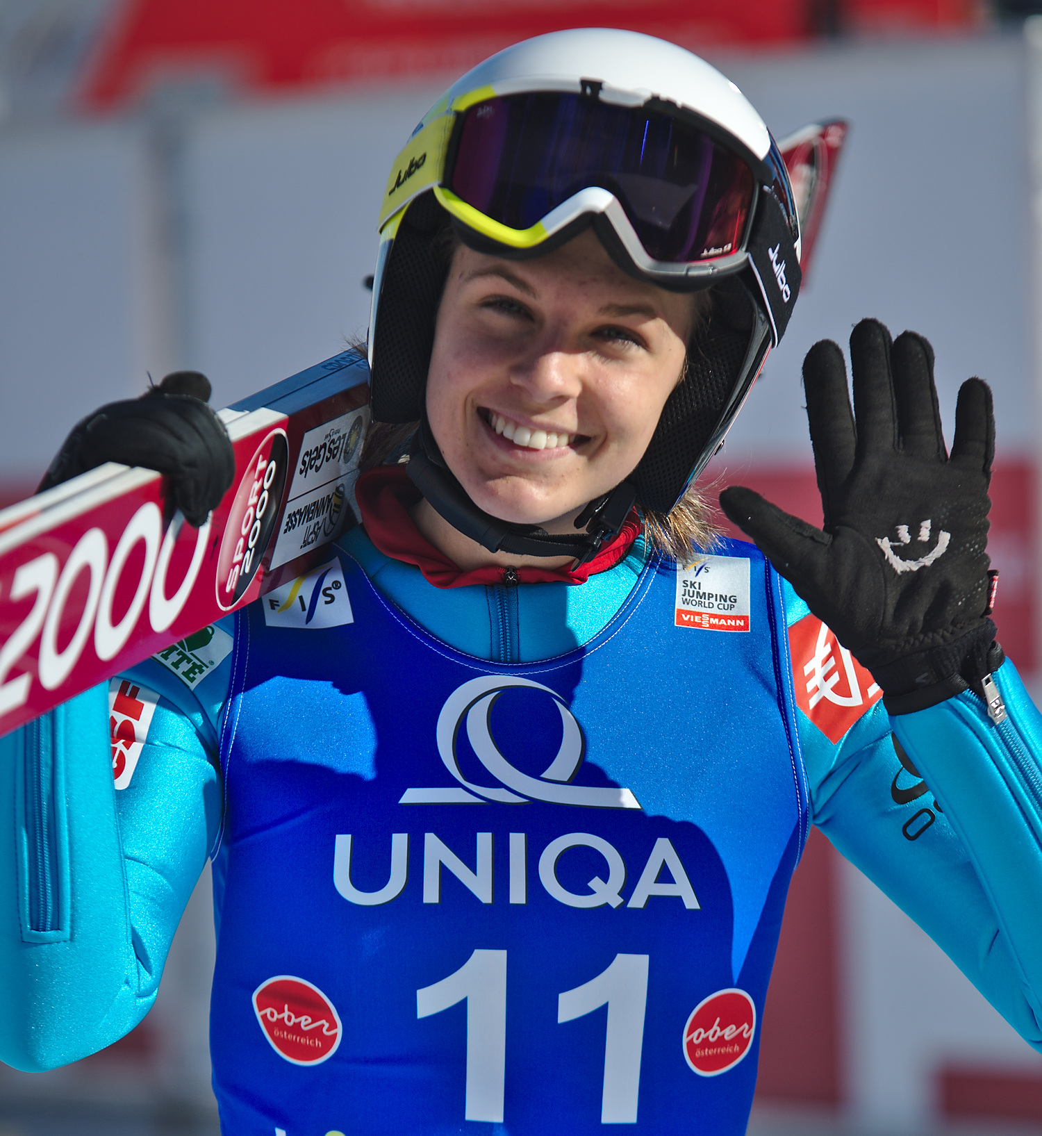 FIS Ski Jumping World Cup Ladies Hinzenbach 2017. Bild zeigt Océane Avocat Gros (FRA)